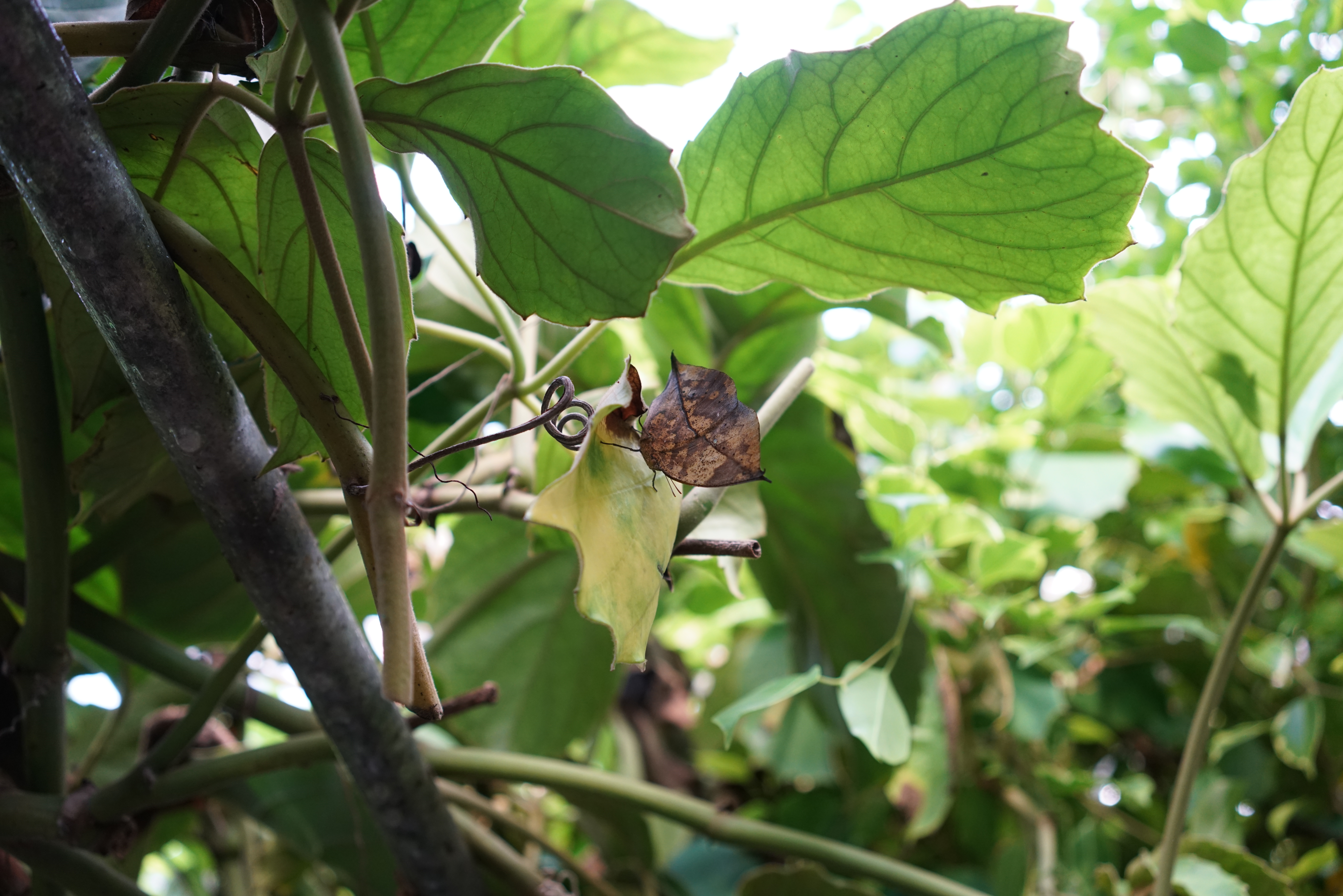 Orange oakleaf butterfly, Fjärilshuset Haga, 2016